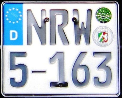 Duitsland NRW kentekenplaat